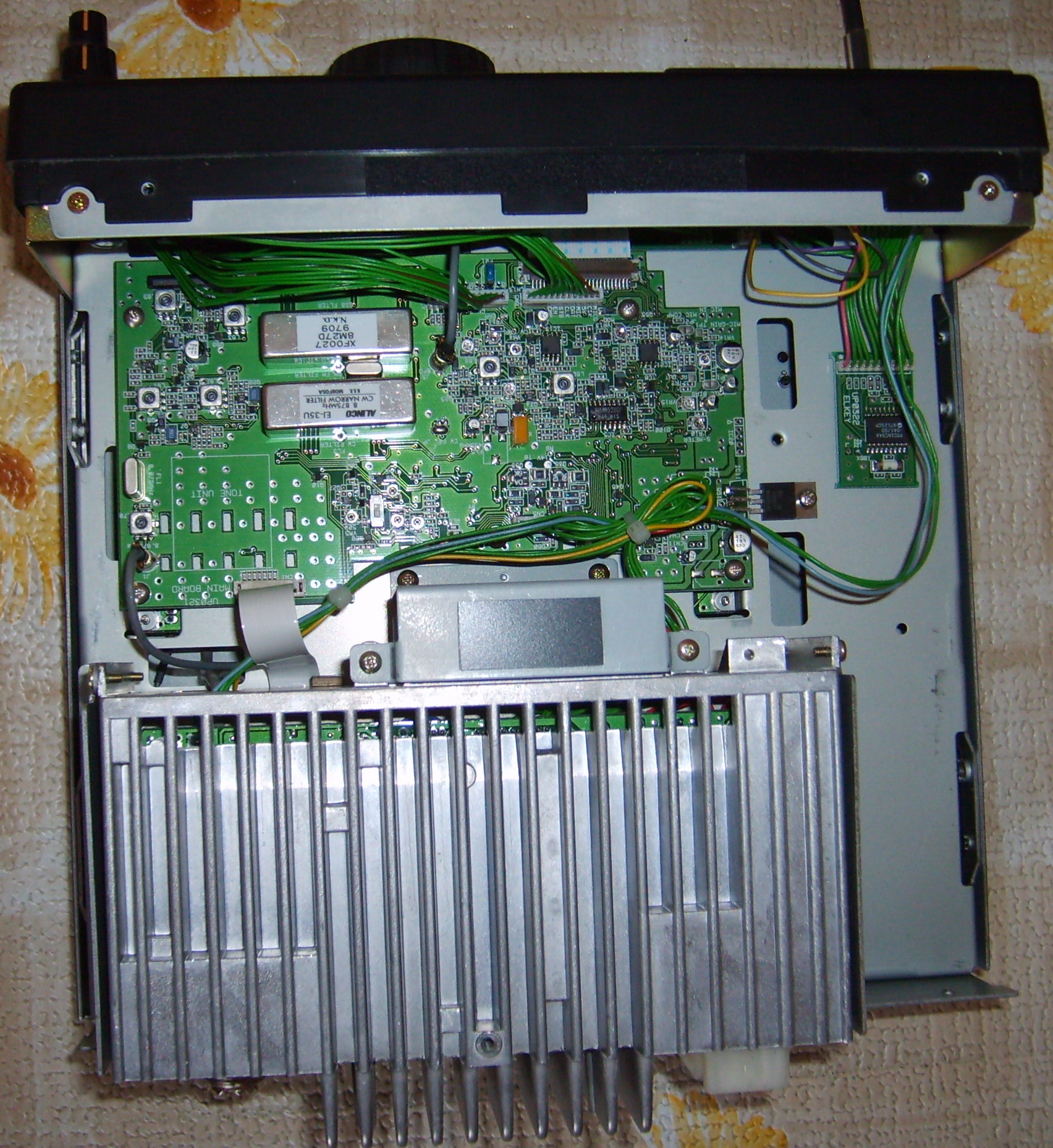 Alinco DX77E